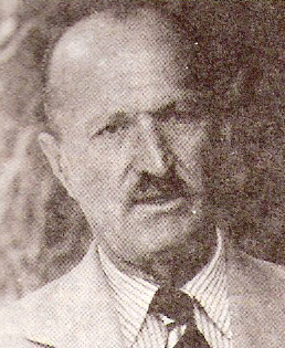 Deolindo Bittel, político argentino